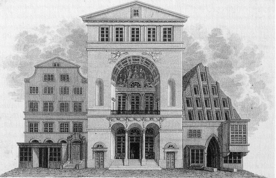 Joseph Ramée (1764-1842), Architekt: Boersenhalle in Hamburg mit alten Nachbargebäuden.